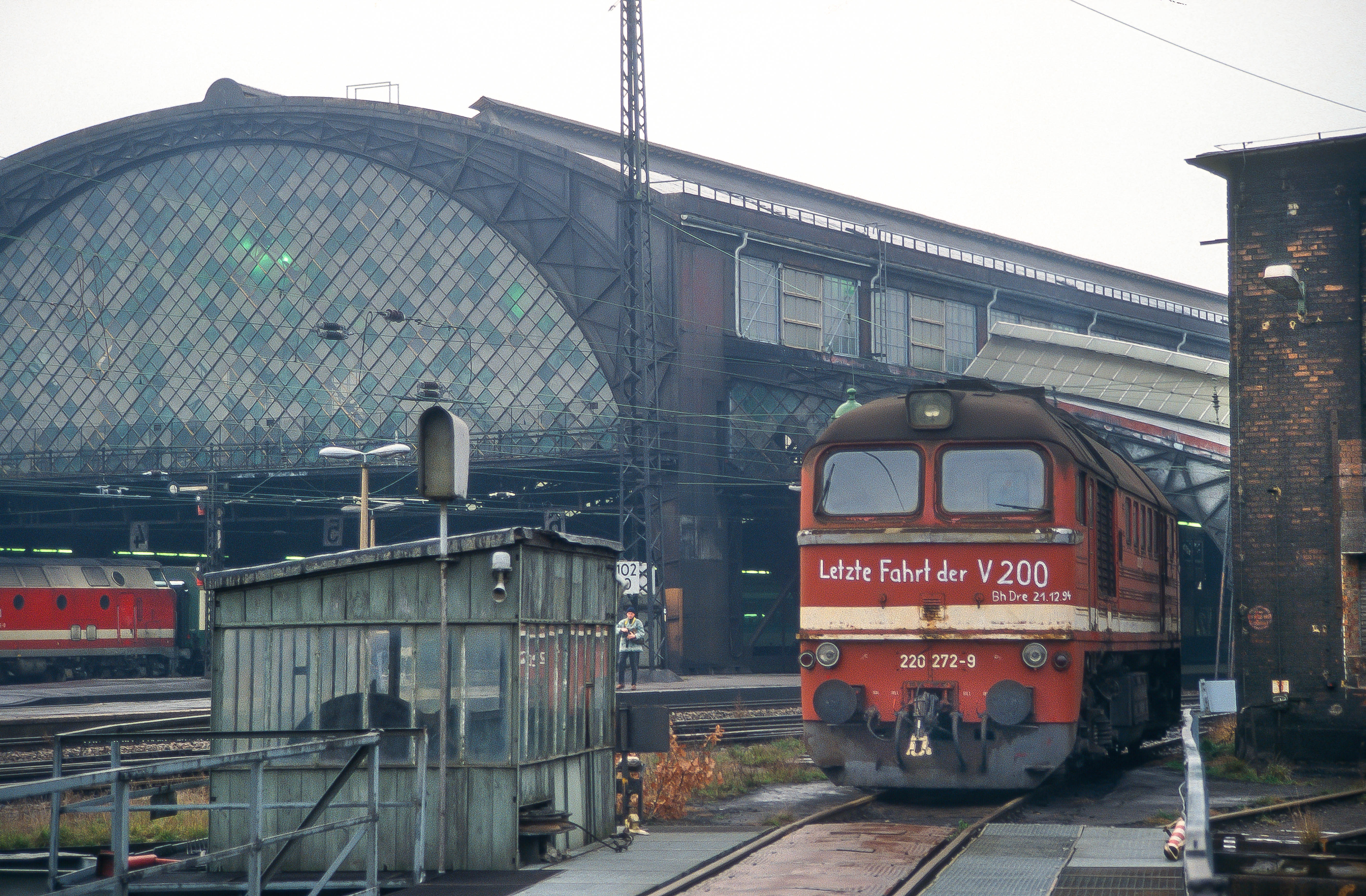 Ende Dienst der Baureihe 220 in Dresden-Neustadt